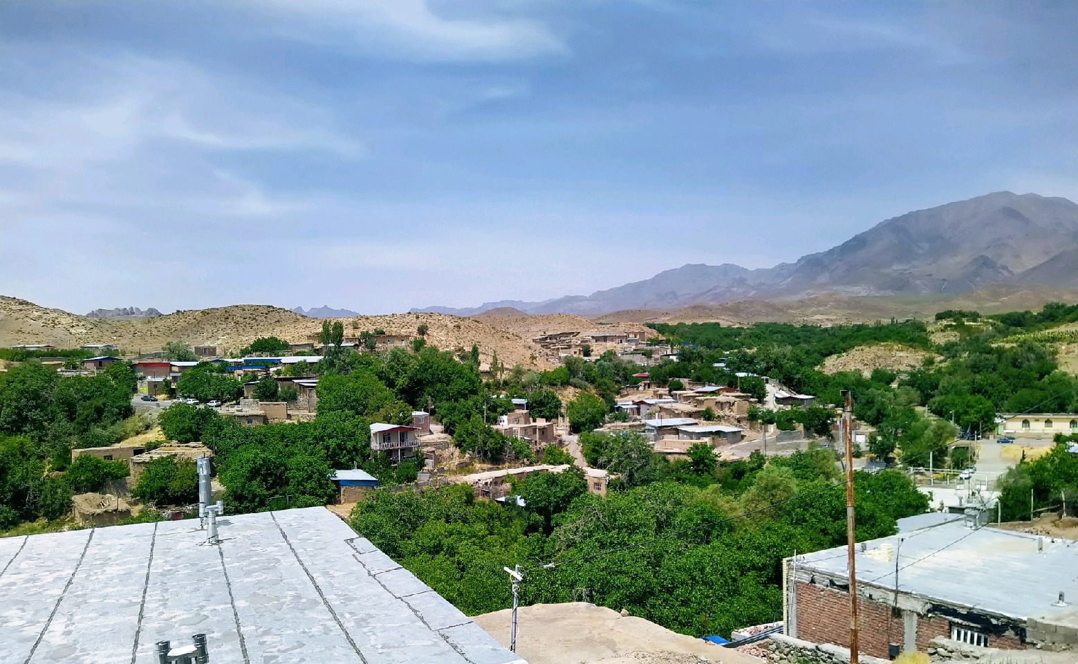 روستای گردشگری سیه بنوئیه